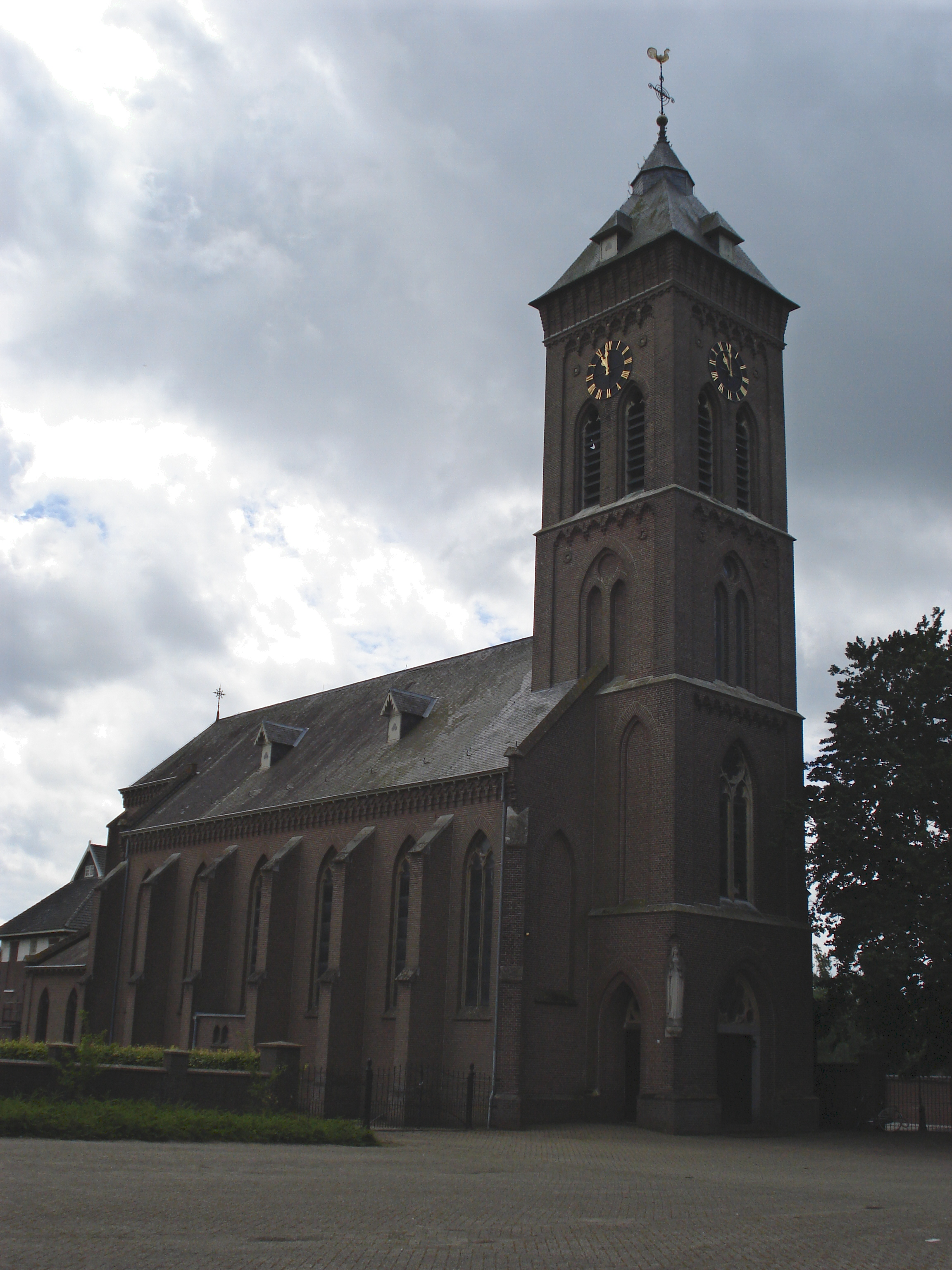 Deursen, l'église. Une tombe funéraire et les cloches dans la tour sont inscrits comme MH